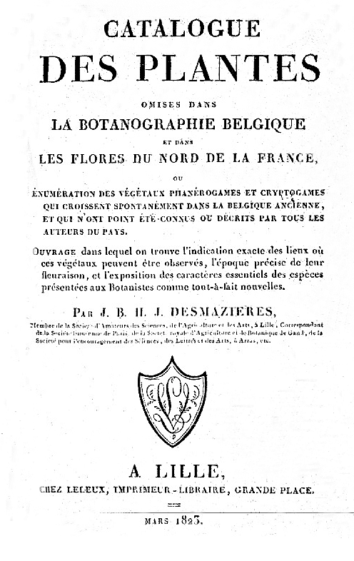 Jean Baptiste Desmazières: Catalogue des plantes omises dans la botanographie belgique et dans les flores du Nord de la France, Editure Leleux, Lille 1823